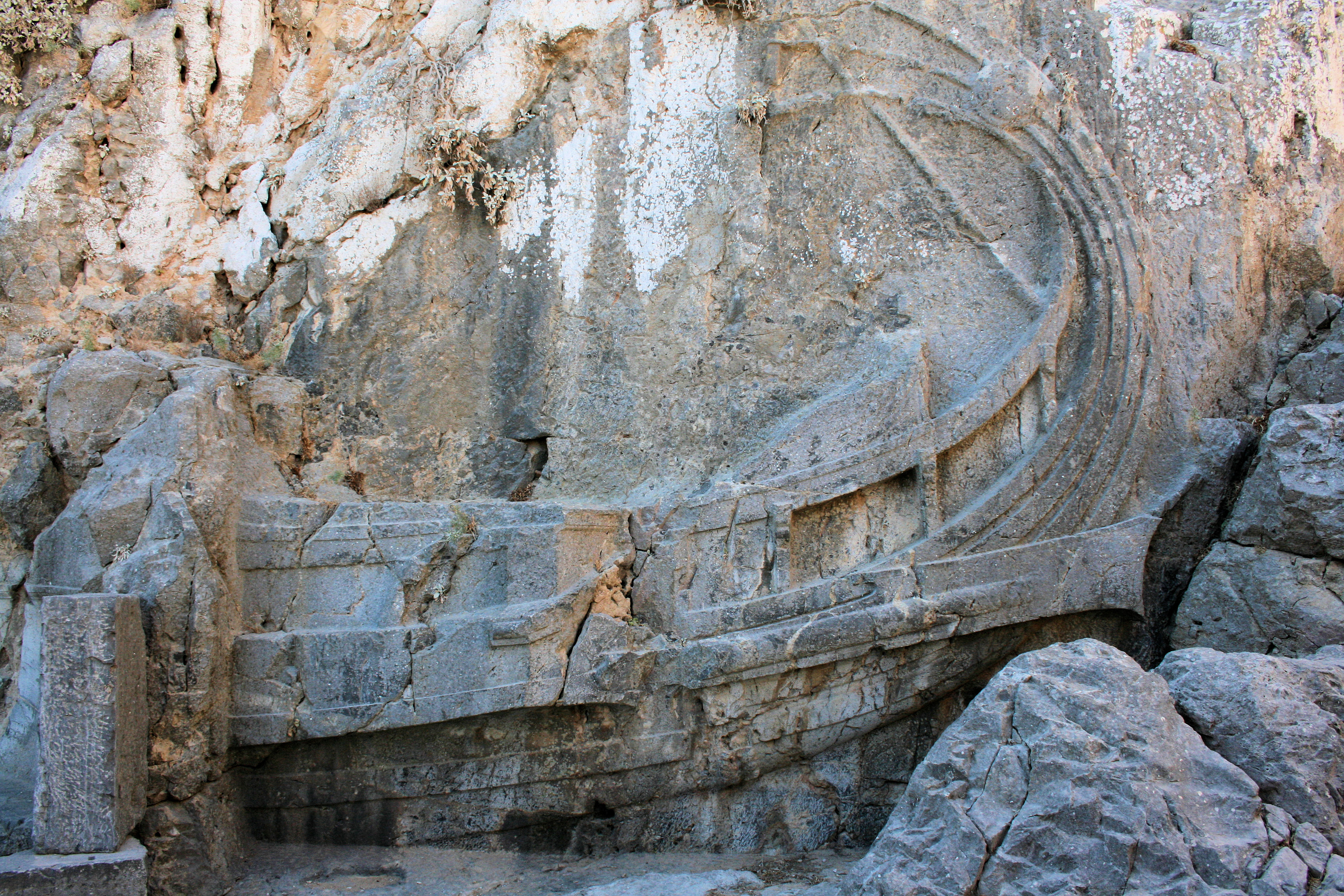 Akropolis_Lindos